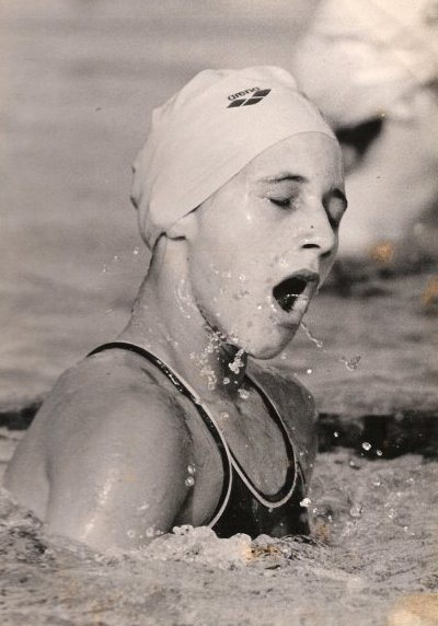 Hadar Rubinstein